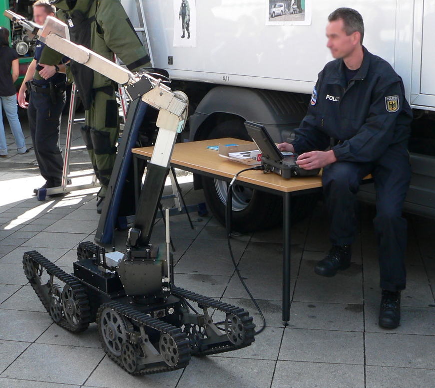 Fernlenkmanipulator der Bundespolizei, Fotoaufnahme bei Veranstaltung "Polizei erleben" am 04./05.09.10 in Hannover auf dem Ernst-August-Platz